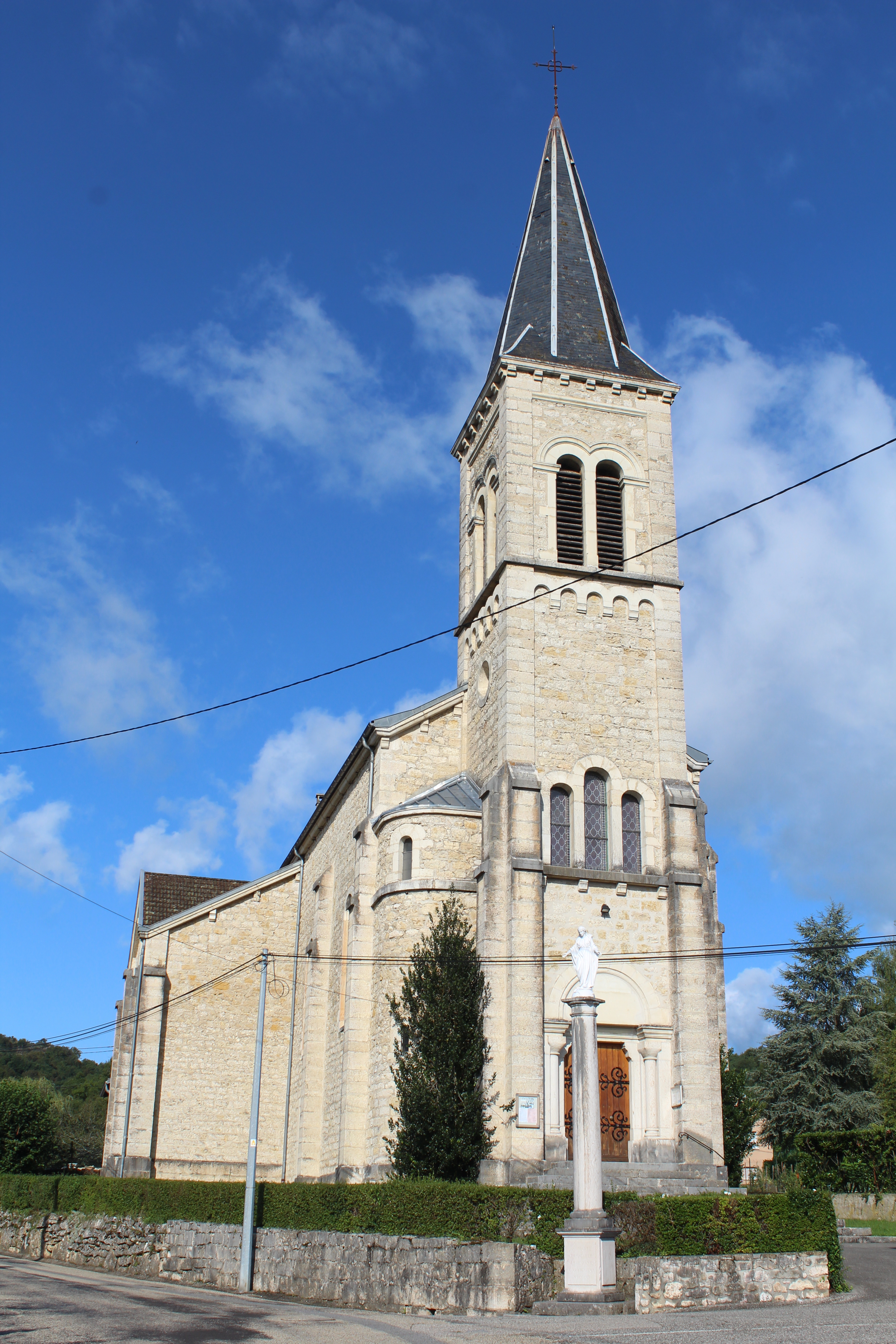 Église Saint-Étienne d'Arbignieu, Arboys-en-Bugey.